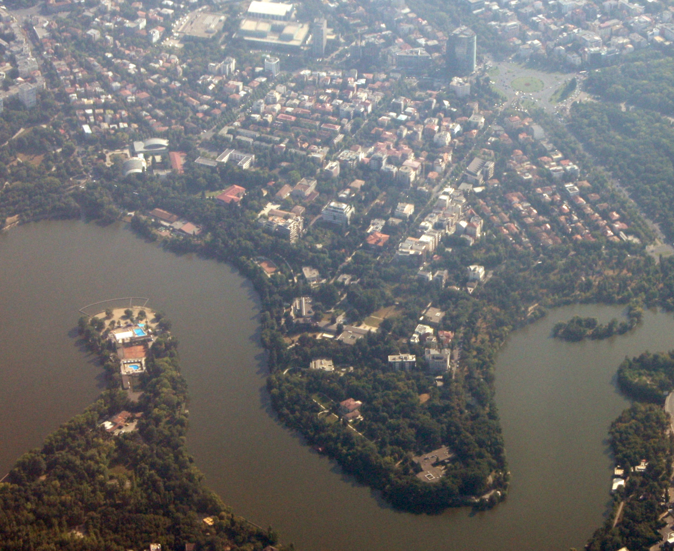 Primăverii, Bucharest, aerial view